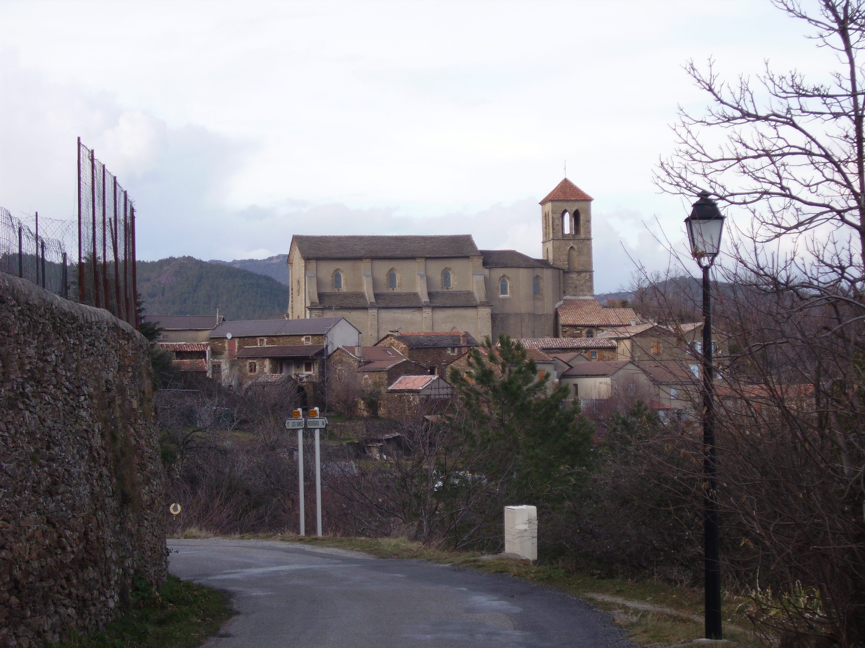 Église de Malbosc